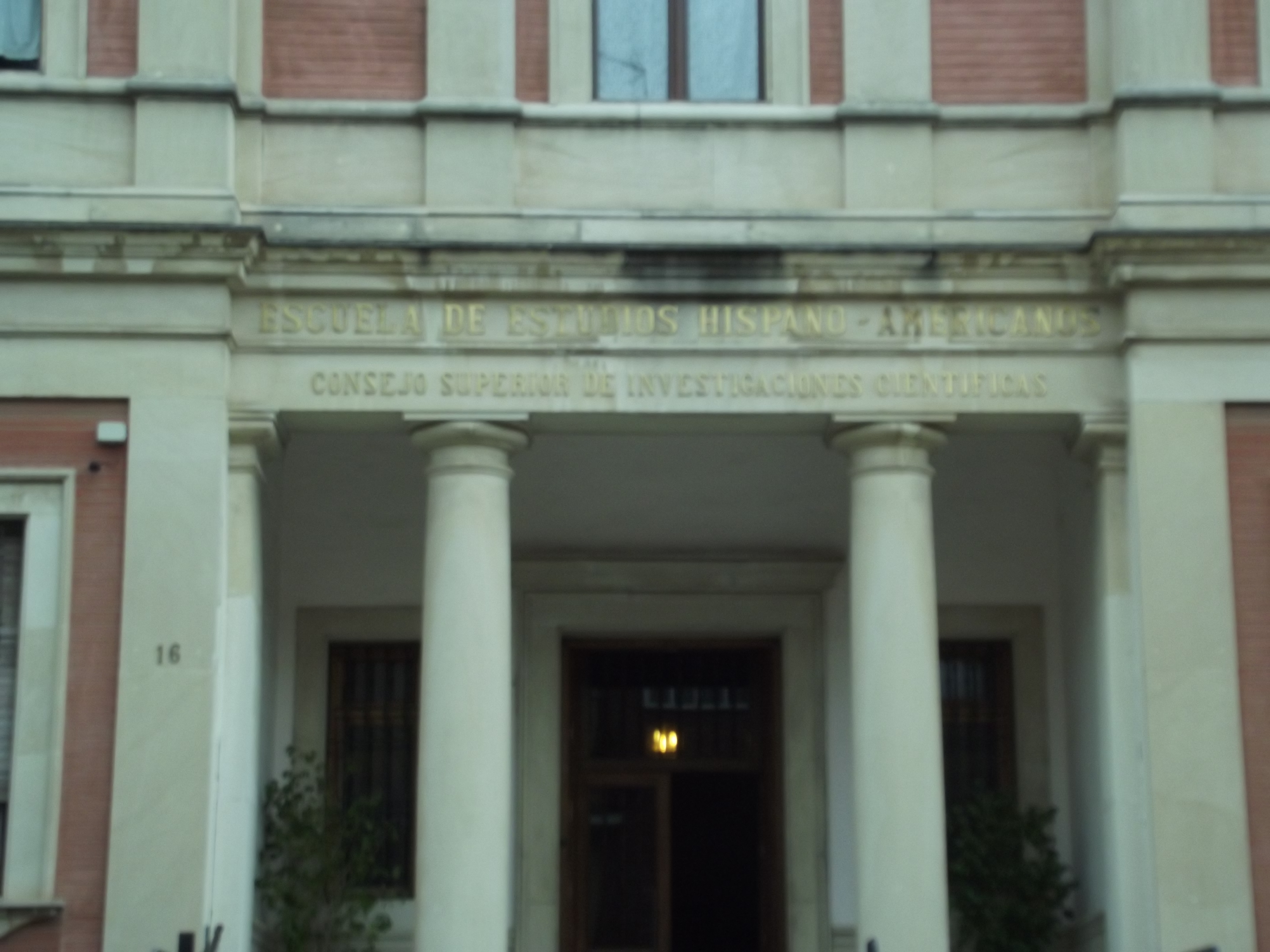 Fachada principal de la Escuela de Estudios Hispano-Americanos, que está situada en la ciudad de Sevilla, (España).